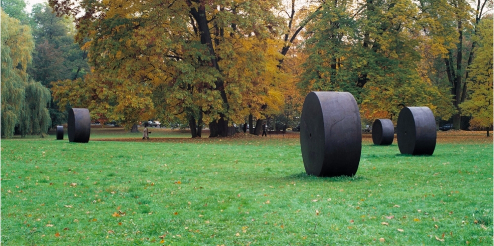 Plastik in Biennale "Bickachsen" 1999